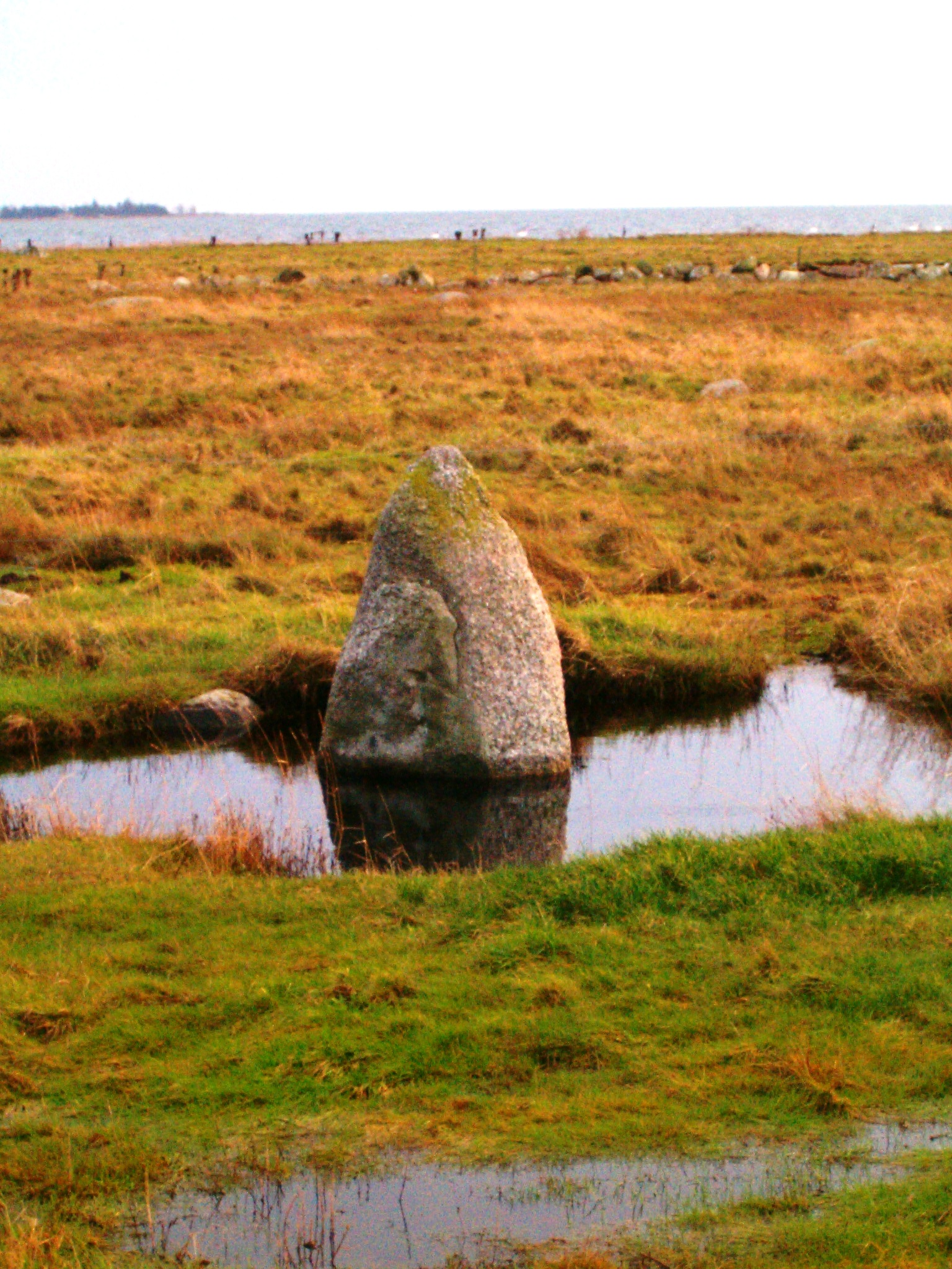 Knækkerygstenen i Frejlev Enghave